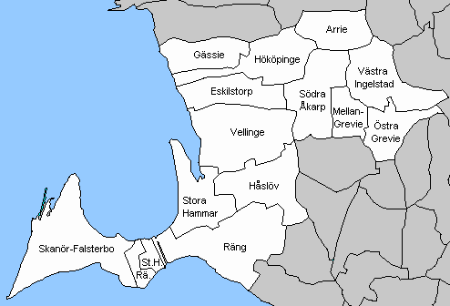 Socken in Vellinge